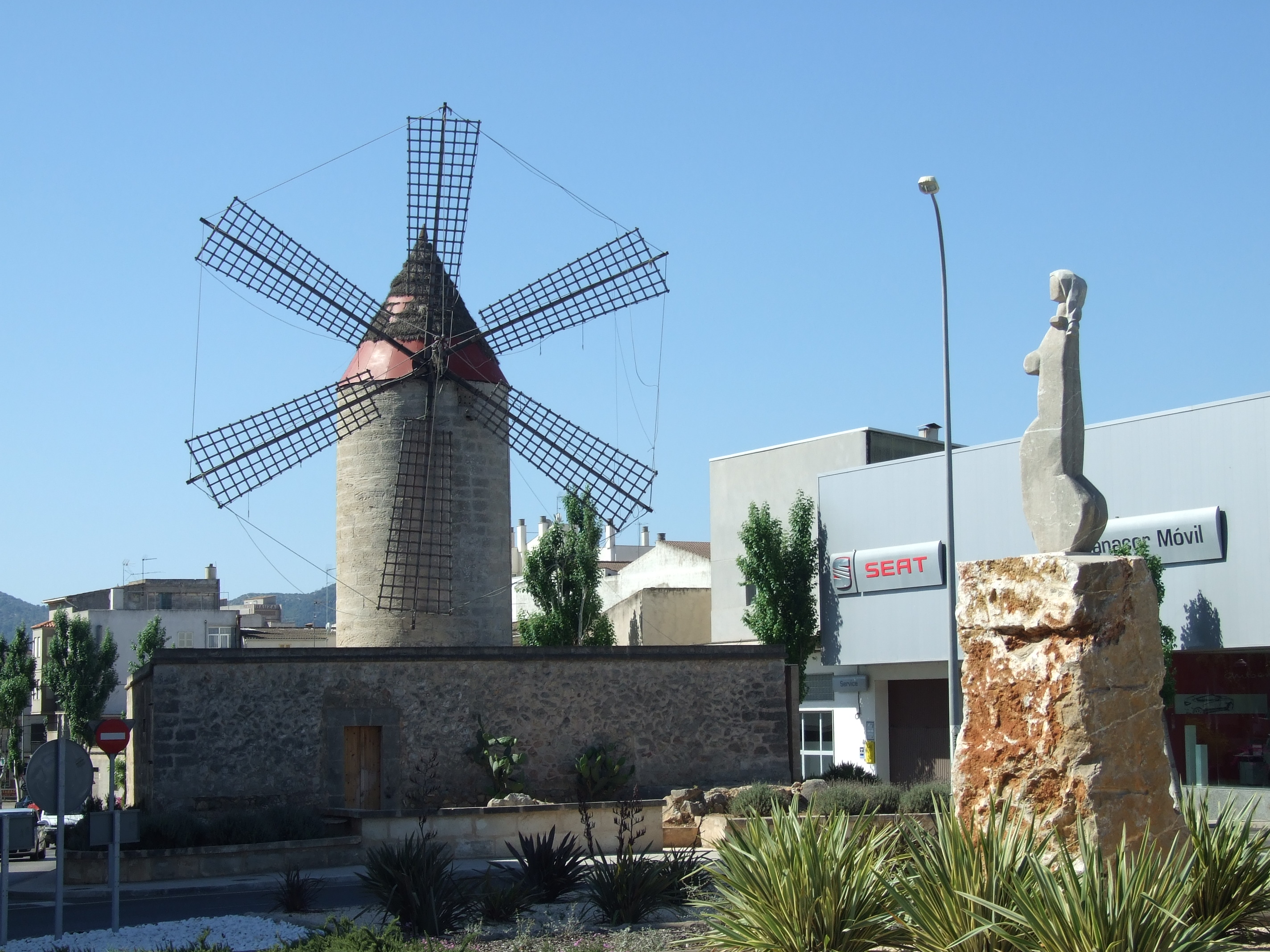 El Molí d'en Polit Mehlmühle Manacor